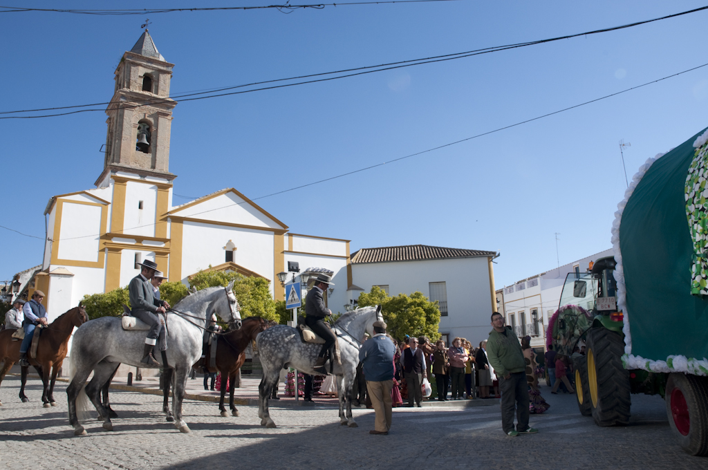 Romería San José Obrero al Vado Yeso, El Saucejo, provincia de Sevilla. Sabado 2 de Mayo de 2009